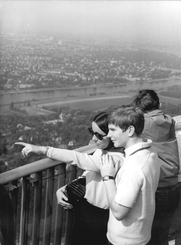 Dresden, Blick auf die Elbe und Umgebung Zentralbild Häßler 17.9.1970 Dresden: Fernsehturm- Vom Aussichtsplateau des Fernsehturms in Dresden-Wachwitz hat man einen weiten Blick auf die Elbe, auf Dresden und die Umgebung der Stadt. Der Fernsehturm wird während des deutsch-sowjetischen Jugendfestivals länger als gewöhnlich geöffnet sein. Bitte beachten Sie dazu unser Foto J0917-0018-001